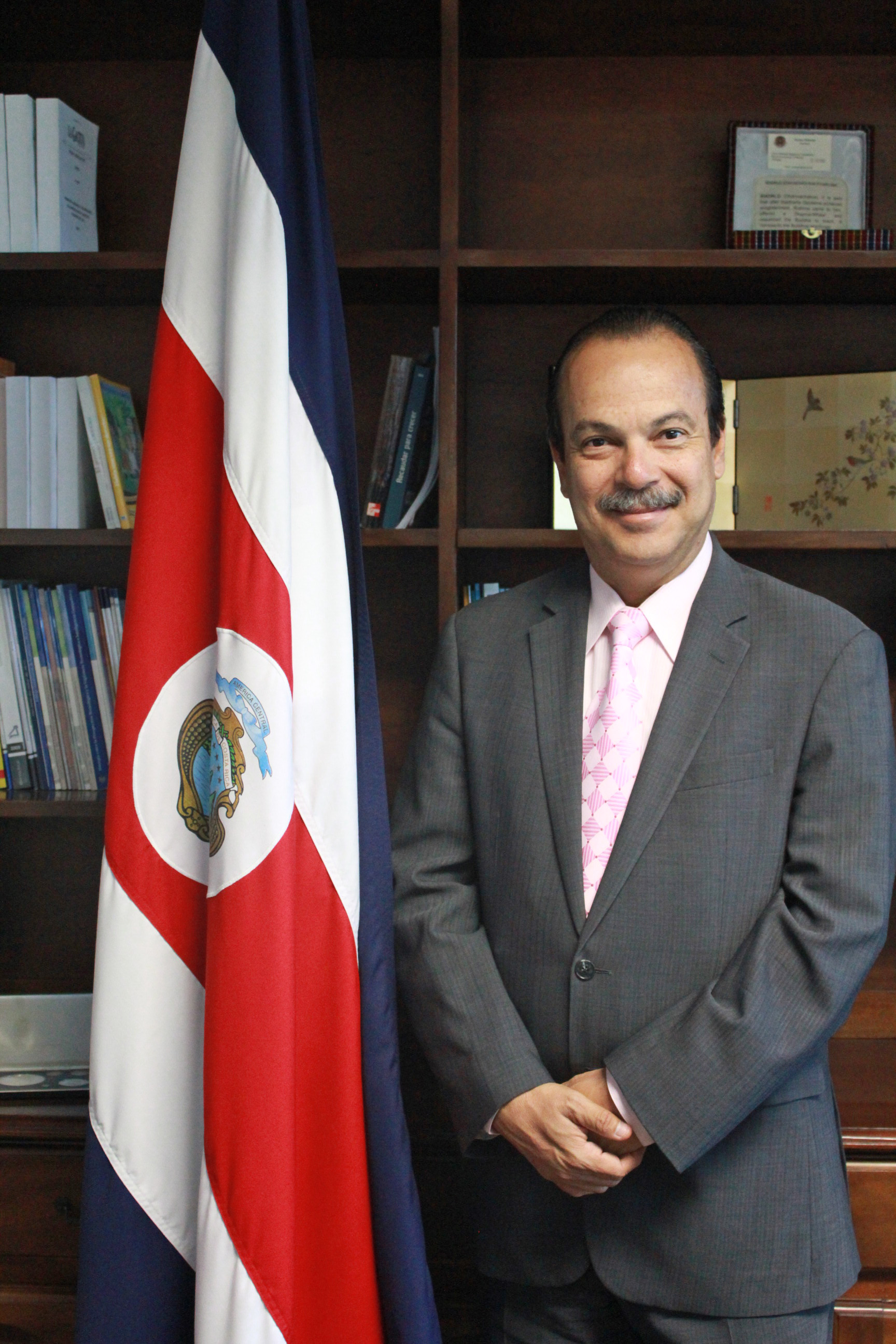 Político, investigador, académico y politólogo costarricense